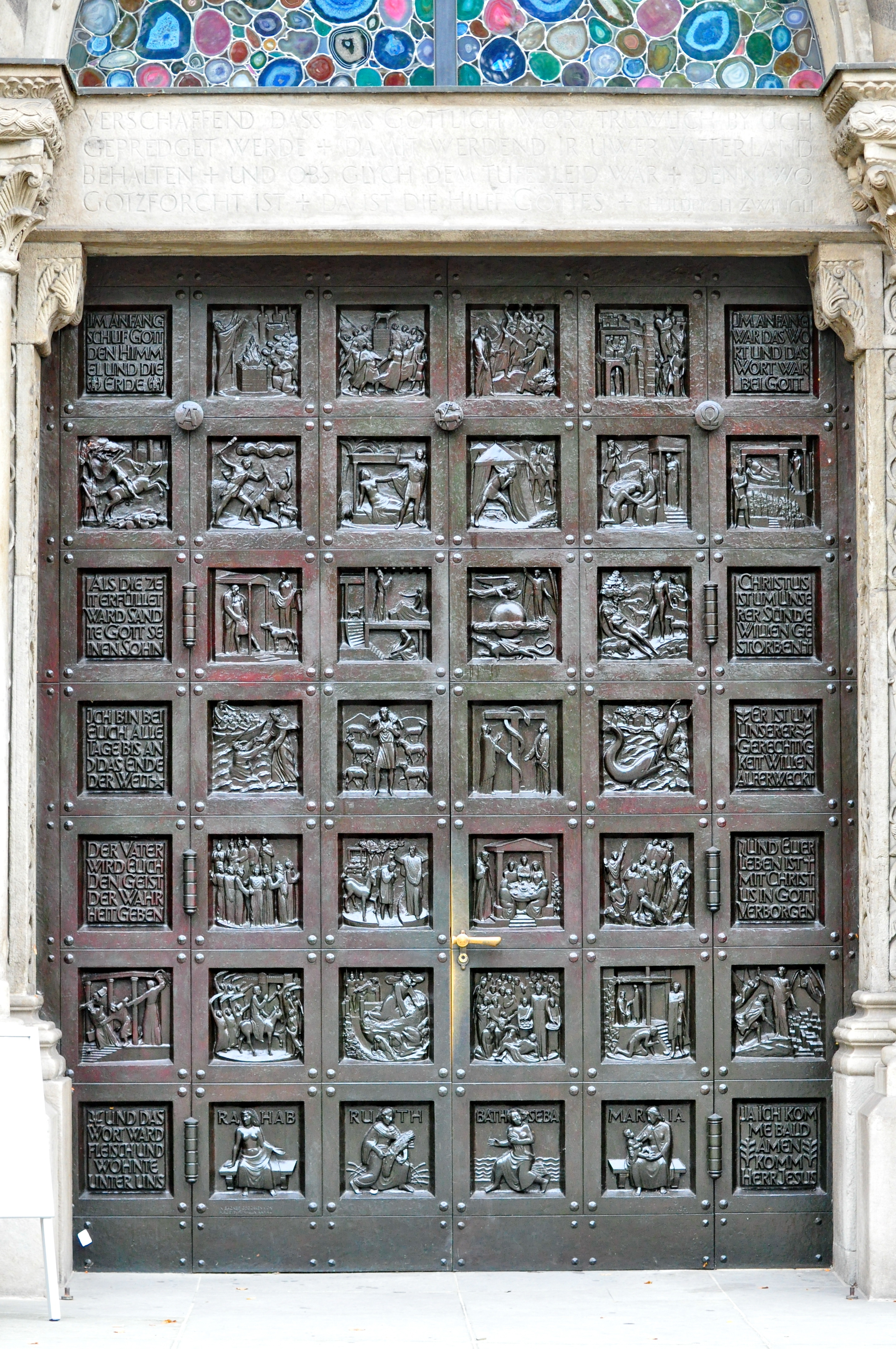 Grossmünster in Zürich (Switzerland)